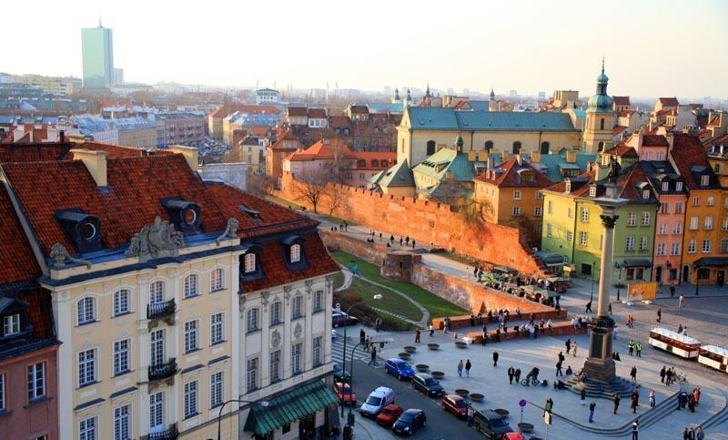 Warszawa (Polska)